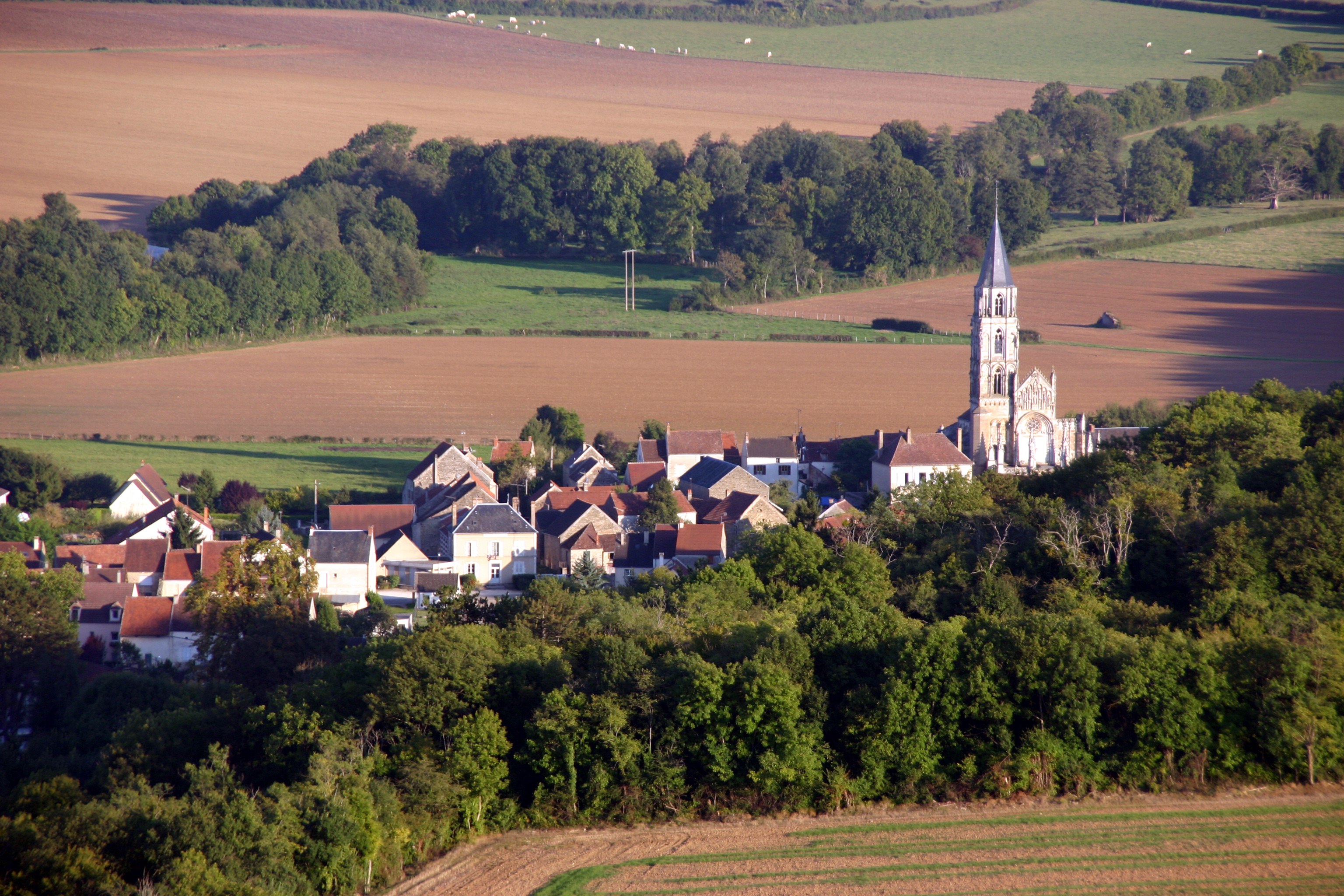 Saint-Père (Yonne)